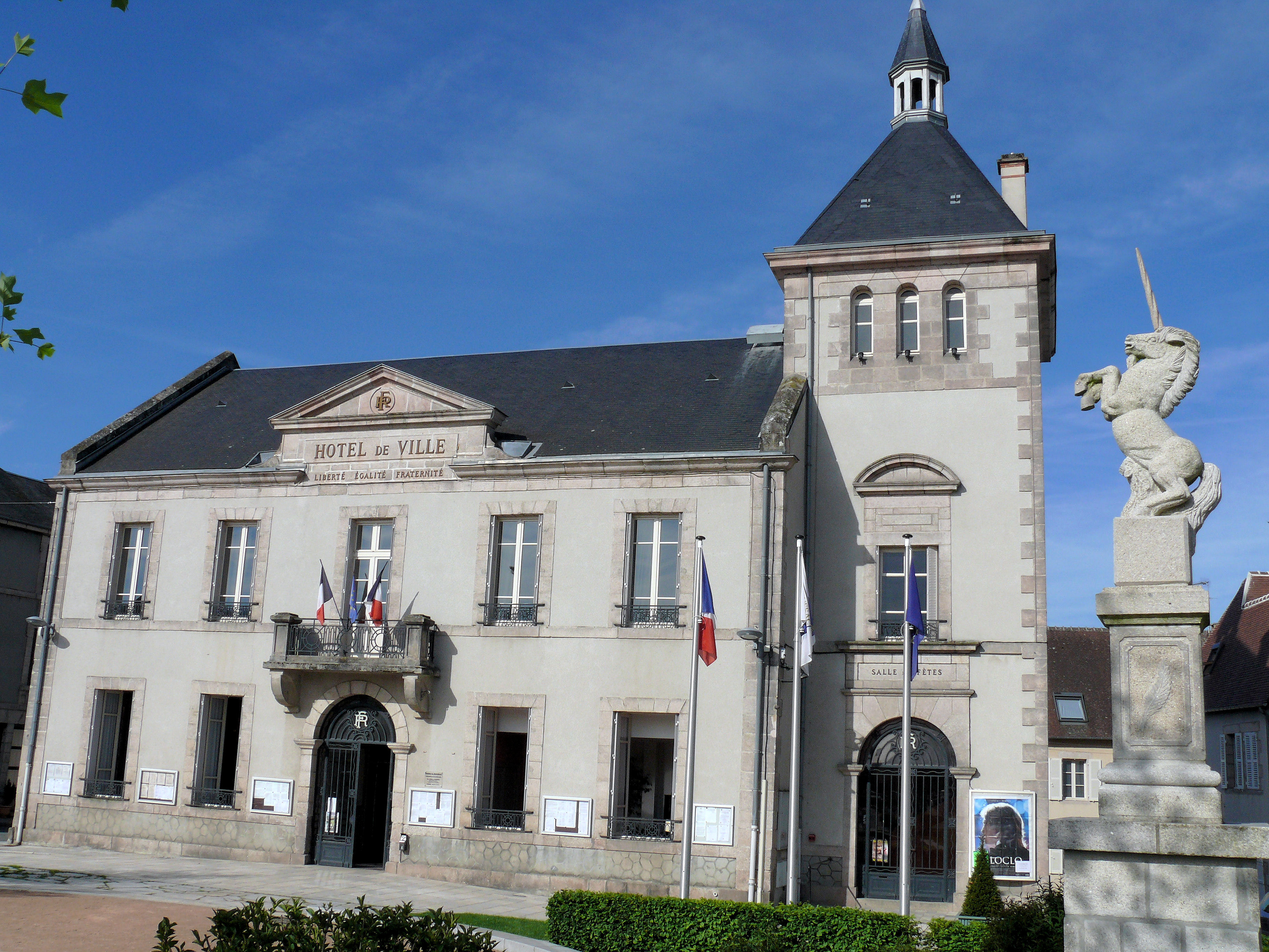 Boussac (Creuse) - Hôtel de ville